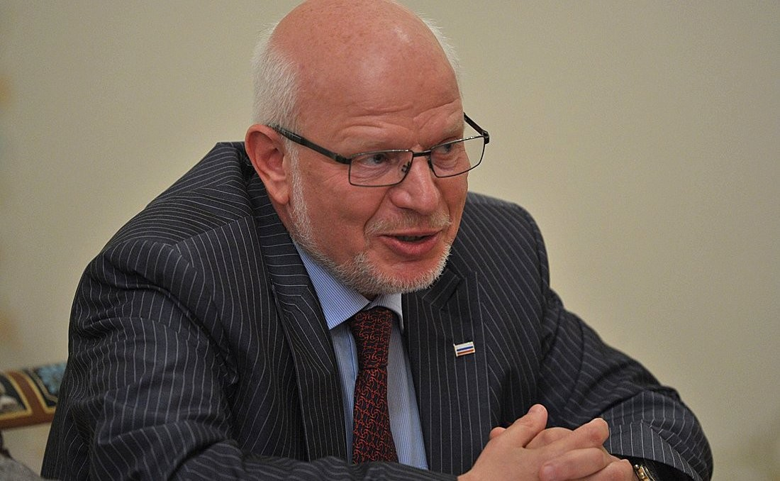 Российский политический деятель Михаил Александрович Федотов на встрече президента России Владимира Путина с руководством партии «Единая Россия».